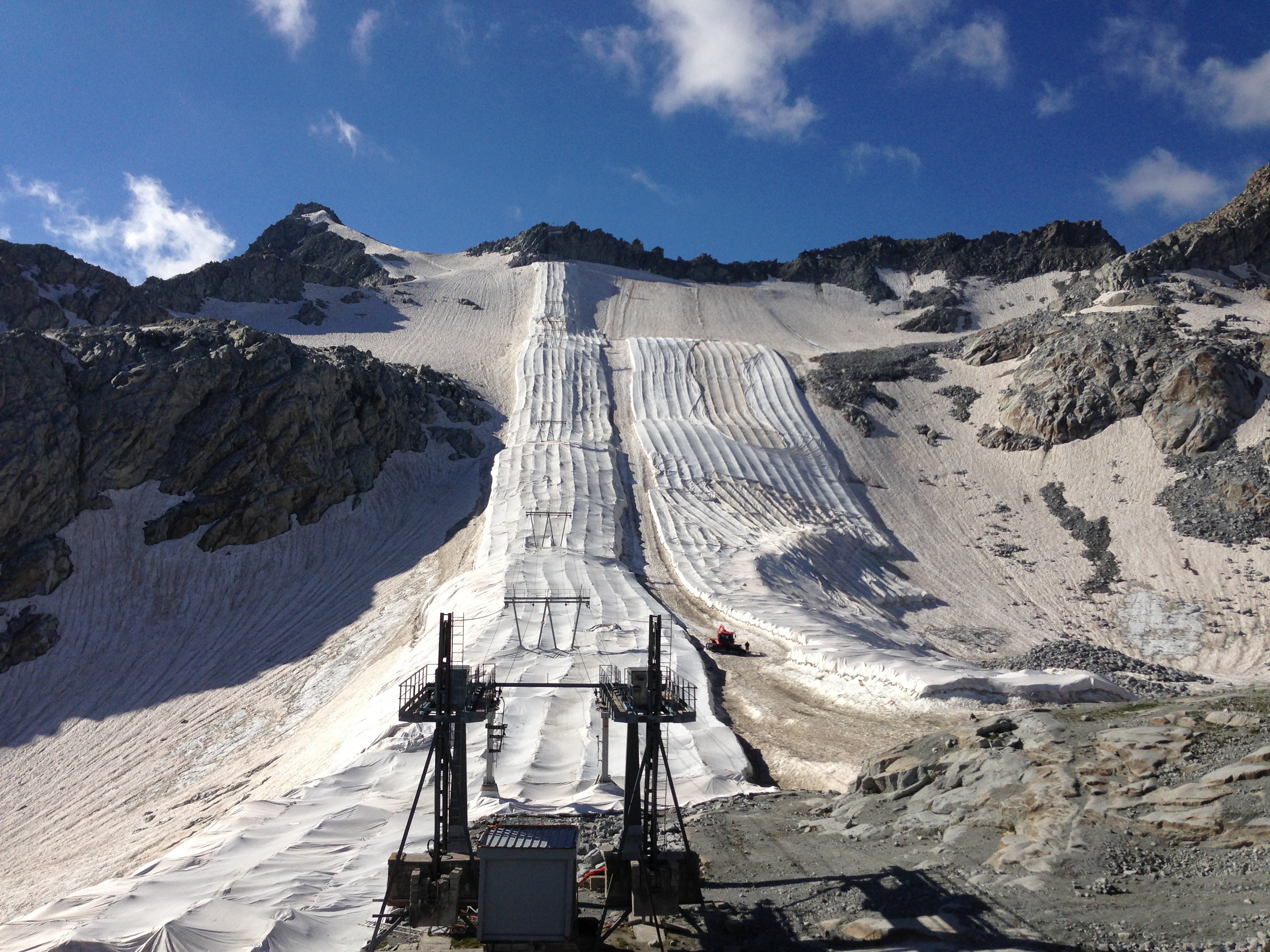 Foto scattata al Ghiacciaio Presena il 12 Agosto 2013